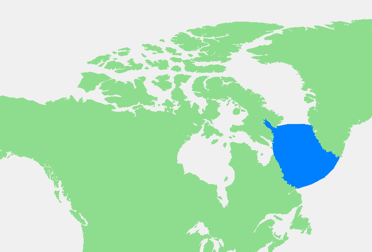 Labrador Sea.PNG